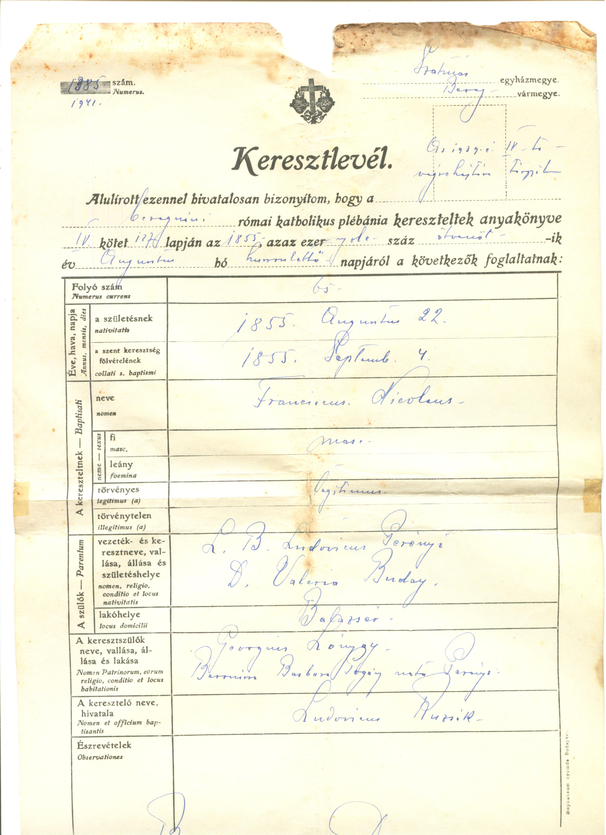 eredeti